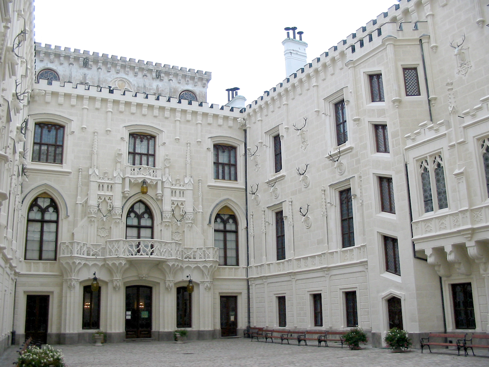 Court of castle Hluboká (Hluboká nad Vltavou)